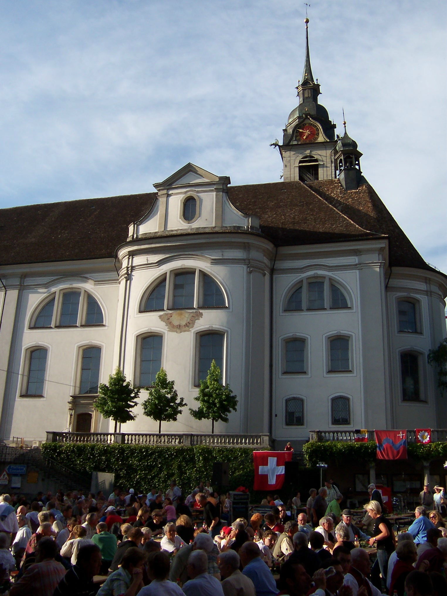 1.August-Rede von Elisabeth Kopp, Schwyz (SZ), 2007